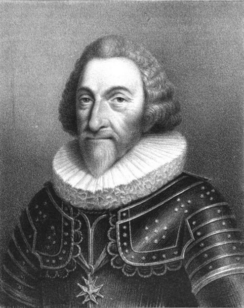 François de Bonne de Lesdiguières